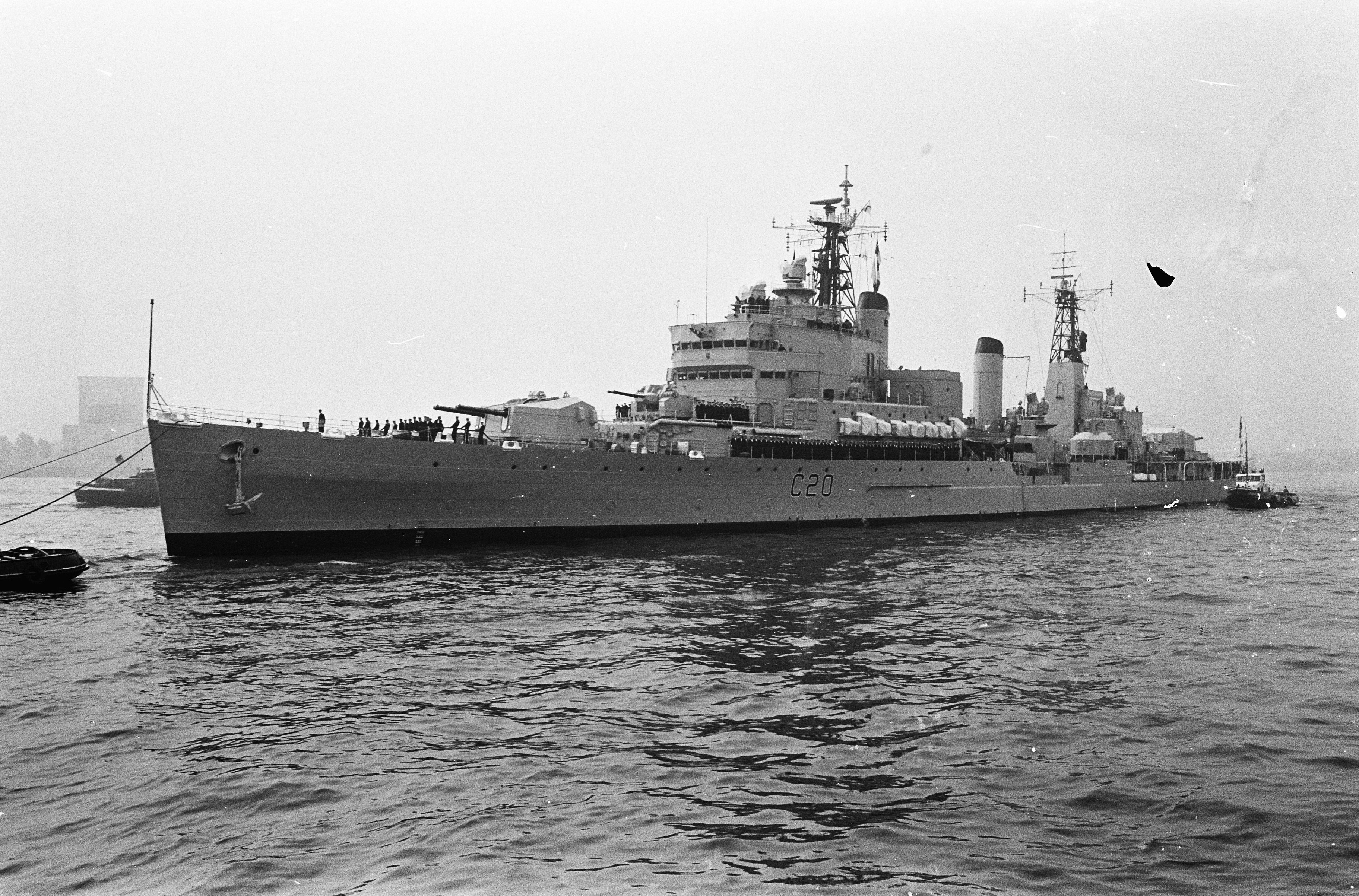 Collectie / Archief : Fotocollectie Anefo Reportage / Serie : [ onbekend ] Beschrijving : Engels vlootbezoek aan Rotterdam. De Engelse kruiser Tiger loopt binnen Datum : 20 september 1963 Locatie : Rotterdam, Zuid-Holland Trefwoorden : vlootbezoeken Persoonsnaam : TIGER Fotograaf : Walta, Winfried / Anefo Auteursrechthebbende : Nationaal Archief Materiaalsoort : Negatief (zwart/wit) Nummer archiefinventaris : bekijk toegang 2.24.01.05 Bestanddeelnummer : 915-5467